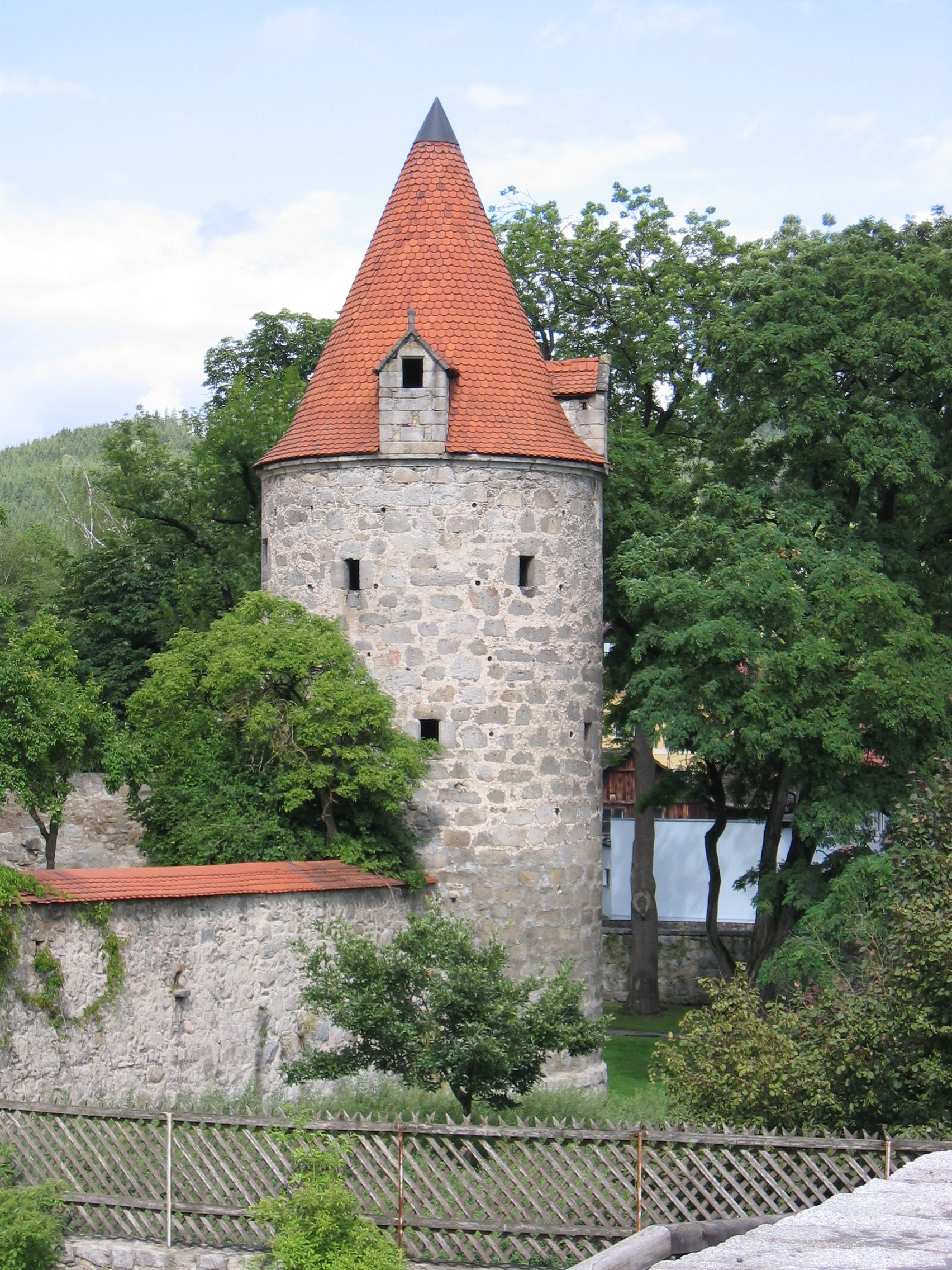 Dechanthofturm in Freistadt